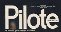 Logotype du magazine Pilote #634 (1971).